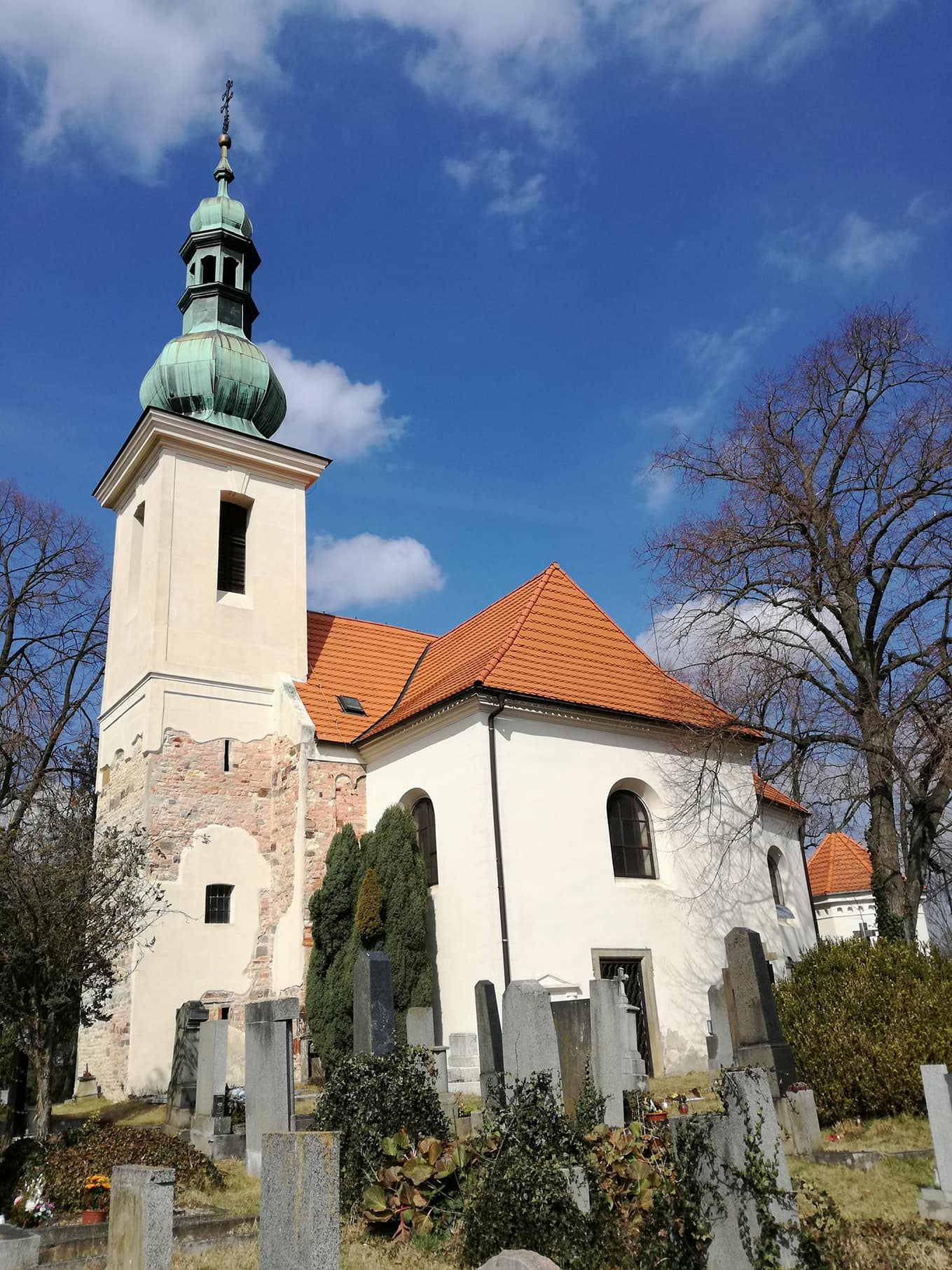 Kostel svatého Havla Zbraslav